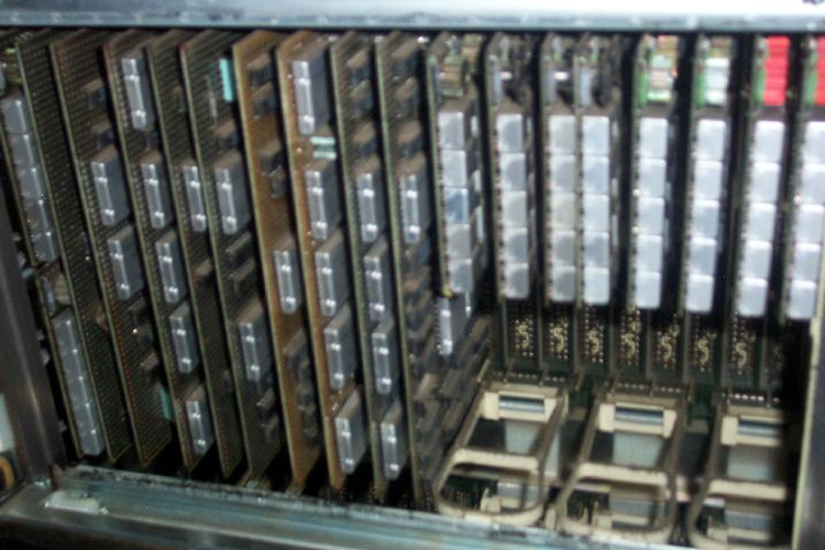 Bildbeschreibung: System /34 Platinen (SLT-Technik) Quelle: selbst fotografiert Fotograf/Zeichner: Oliver Obi